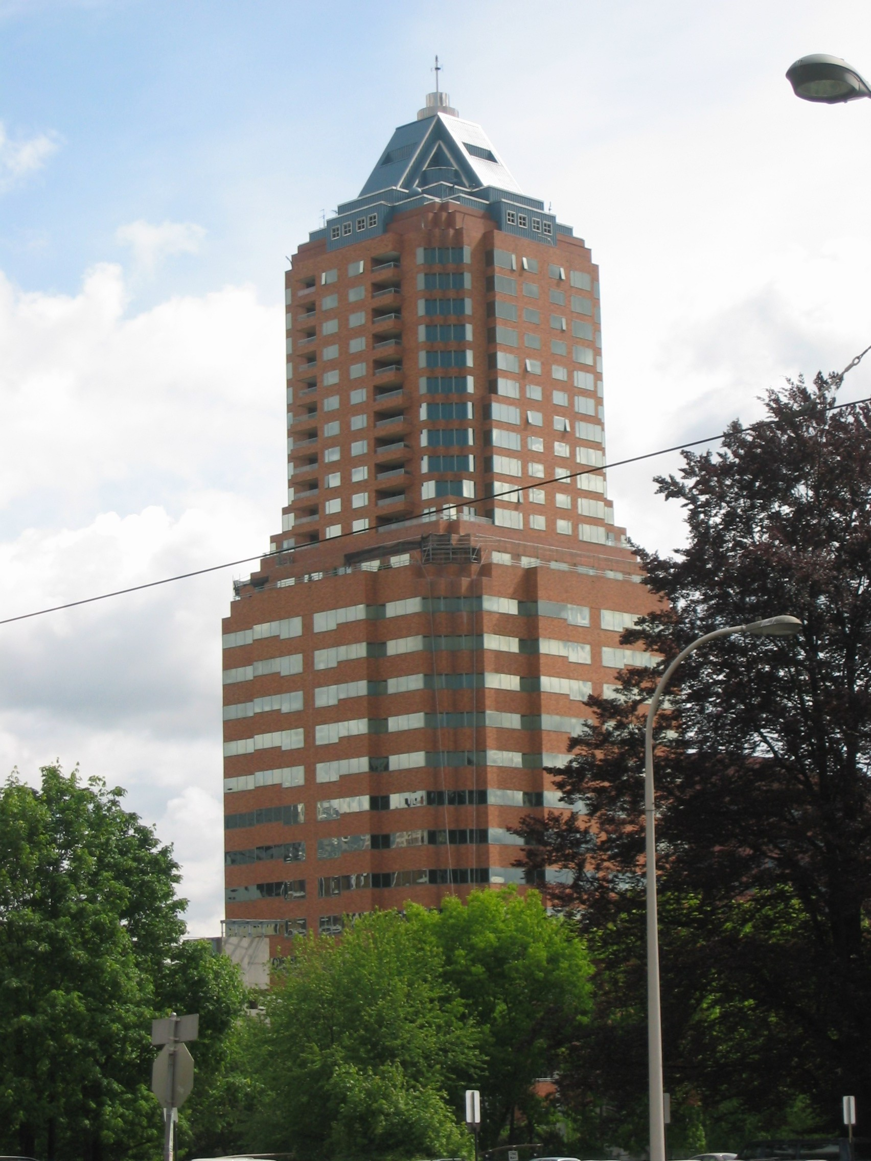 KOIN Center in Portland, Oregon